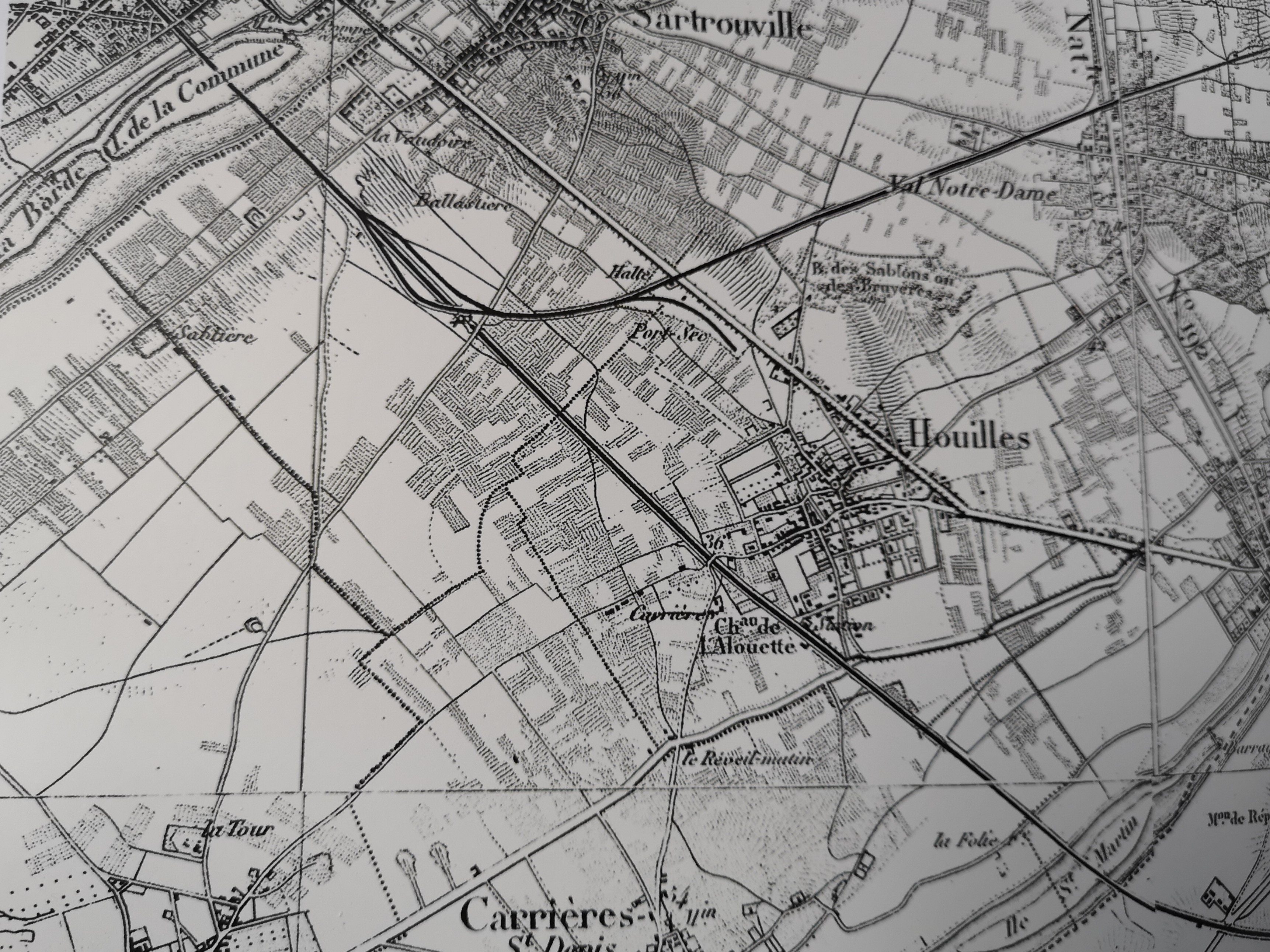 Photo d'un détail de la carte établie par le général Pelet en 1859 que le département de la Seine